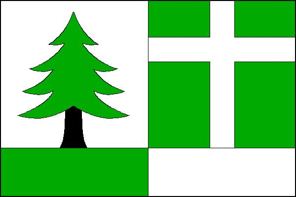 Vlajka obce Krásná Hora